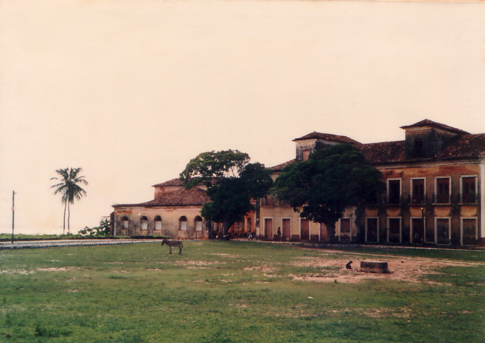 Alcântara, Maranhão, Brasil.